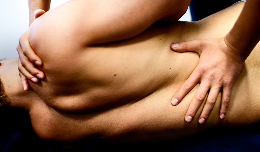 Kiropraktikk defineres som en helseprofesjon som befatter seg med diagnostikk, behandling og forebygging av biomekaniske feilfunksjoner i bevegelsesapparatet samt vurderer effekten av dette på nervesystemet og individets generelle helsetilstand. Behandlingen baseres i stor grad på manuelle metoder.